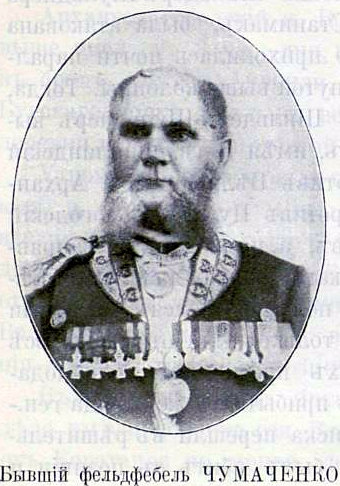 Фелдфебел Прокопий Чумаченко, знаменосец на 17-ти Архангелогородски пехотен полк, участник в Руско-турската Освободителна война 1877-1878 г.